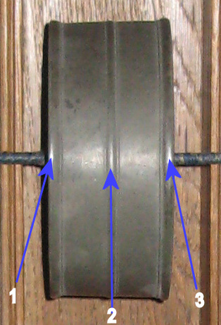 Tambour en éléments soudés avec ses trois renflements pour identification.